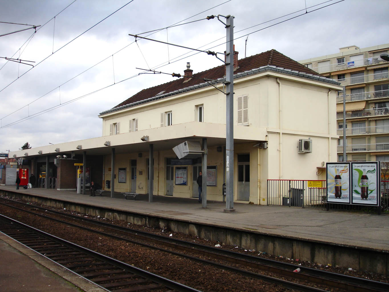 Gare de Franconville - Le Plessis-Bouchard (Val-d'Oise), France